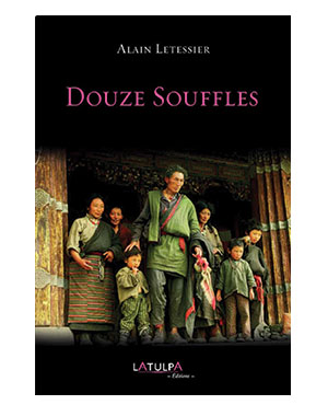 Dans son autobiographie, Douze Souffles il mentionne ces 30 années passées en Asie, pendant lequel il fera des rencontres décisives (notamment le Sherpa et alpiniste Tensing Norgay) qui l’ouvriront à de nouvelles perspectives.